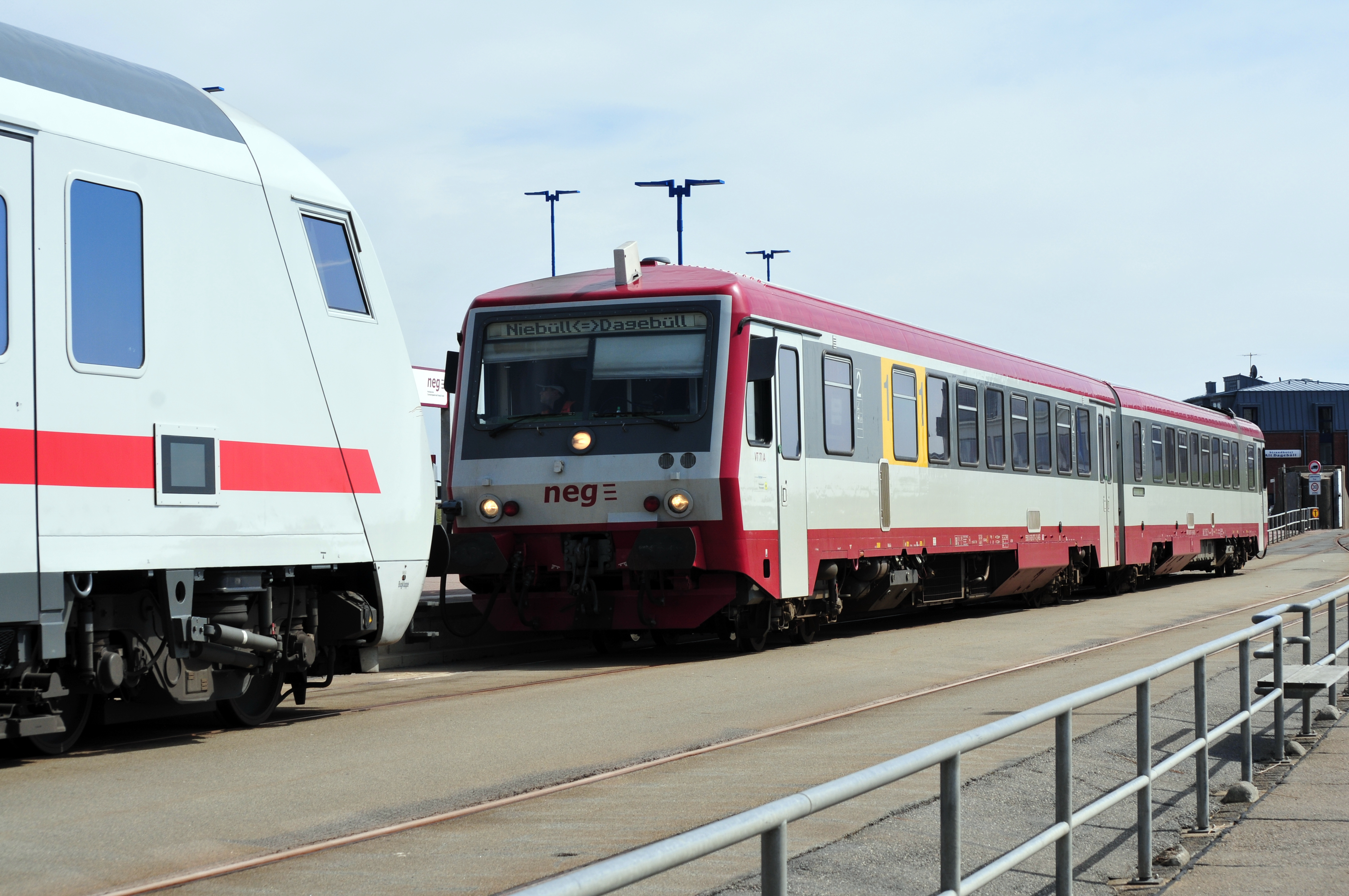 Dagebüll